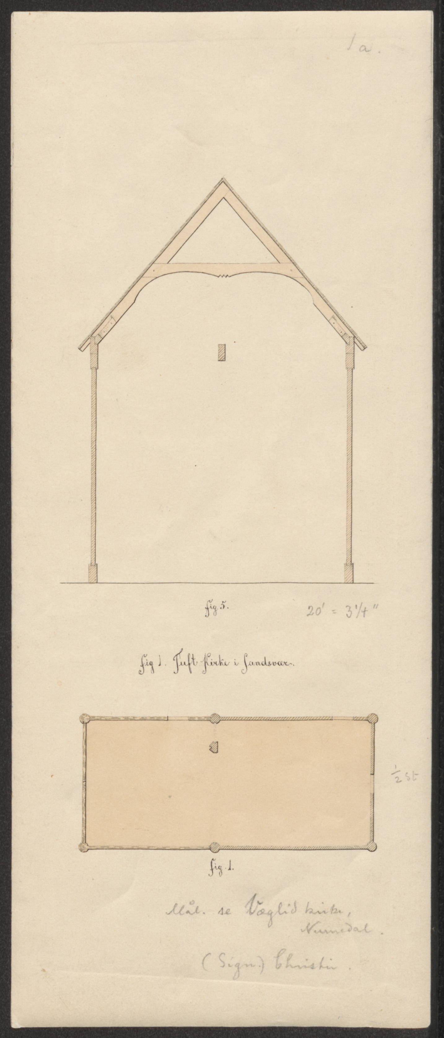 Bildet er hentet fra Riksantikvaren. plan og snitt Eier : Riksantikvaren Sted : Norway, Buskerud, Kongsberg Emneord: STAVKIRKER Medium : Tusj Akvarell